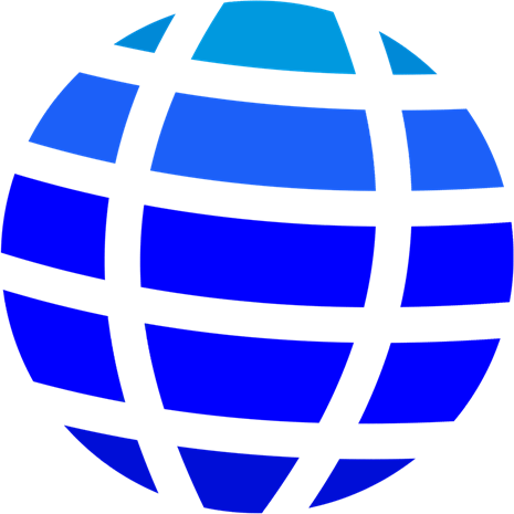 Logo de la Editorial Universal